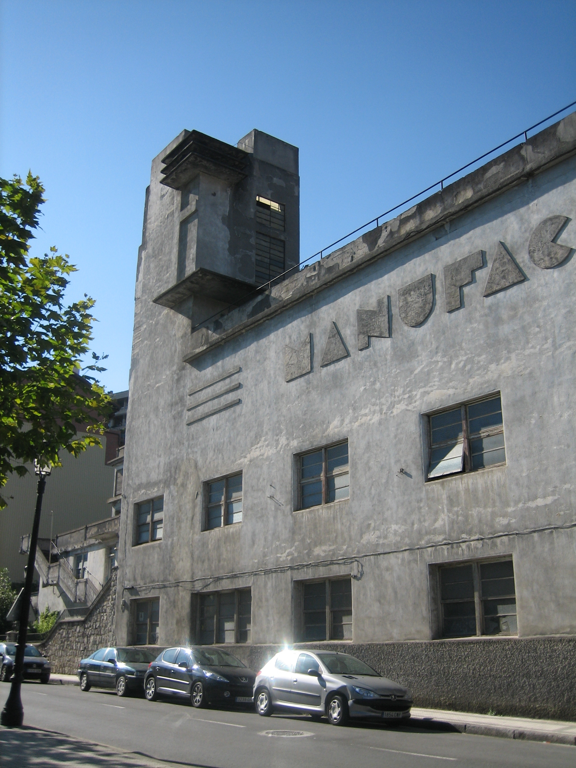 Olaran lantokiko dorrea. Eraikina Beasaindik Ordiziarako bidean aurkitzen da CAFen parean JM Iturriotz kalean. XX. mendearen hasierako arkitektura razionalistaren adibiderik garbiena, espekulazio urbanistikoaren erdian dago une honetan berau eraitsi eta etxebizitzak egiteko asmoa baidu Beasaingo Udalak. Ondare kultural eta arkitektoniko itzela.